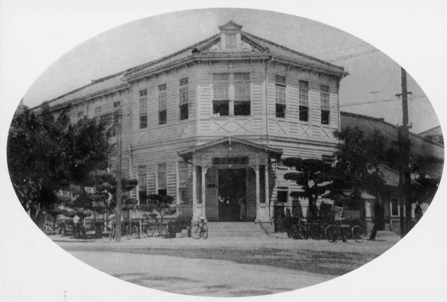 1908年落成的臺中郵便局，位於台中市寶町一丁目。